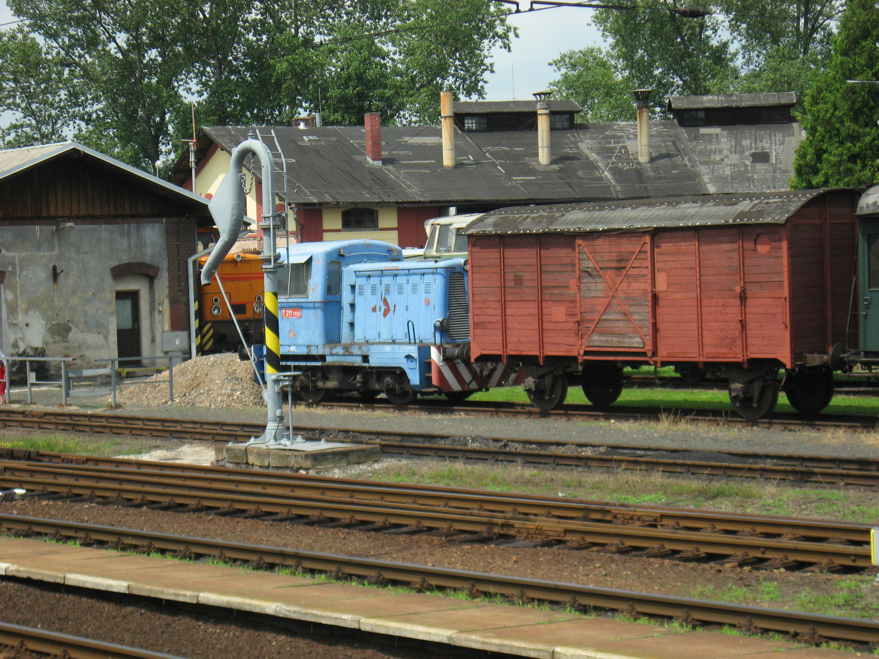 Lokomotiva u Jaroměře